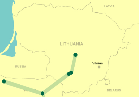 LitPol jungtis